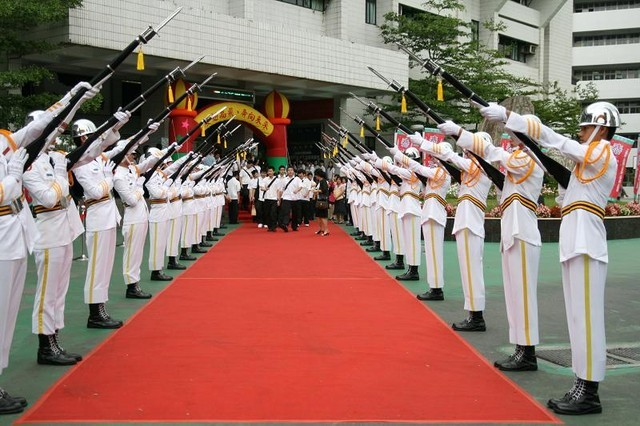 泰北高中畢業典禮，泰北高中樂儀隊槍門。